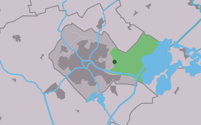 Kaartsje fan himrik fan Offenwier